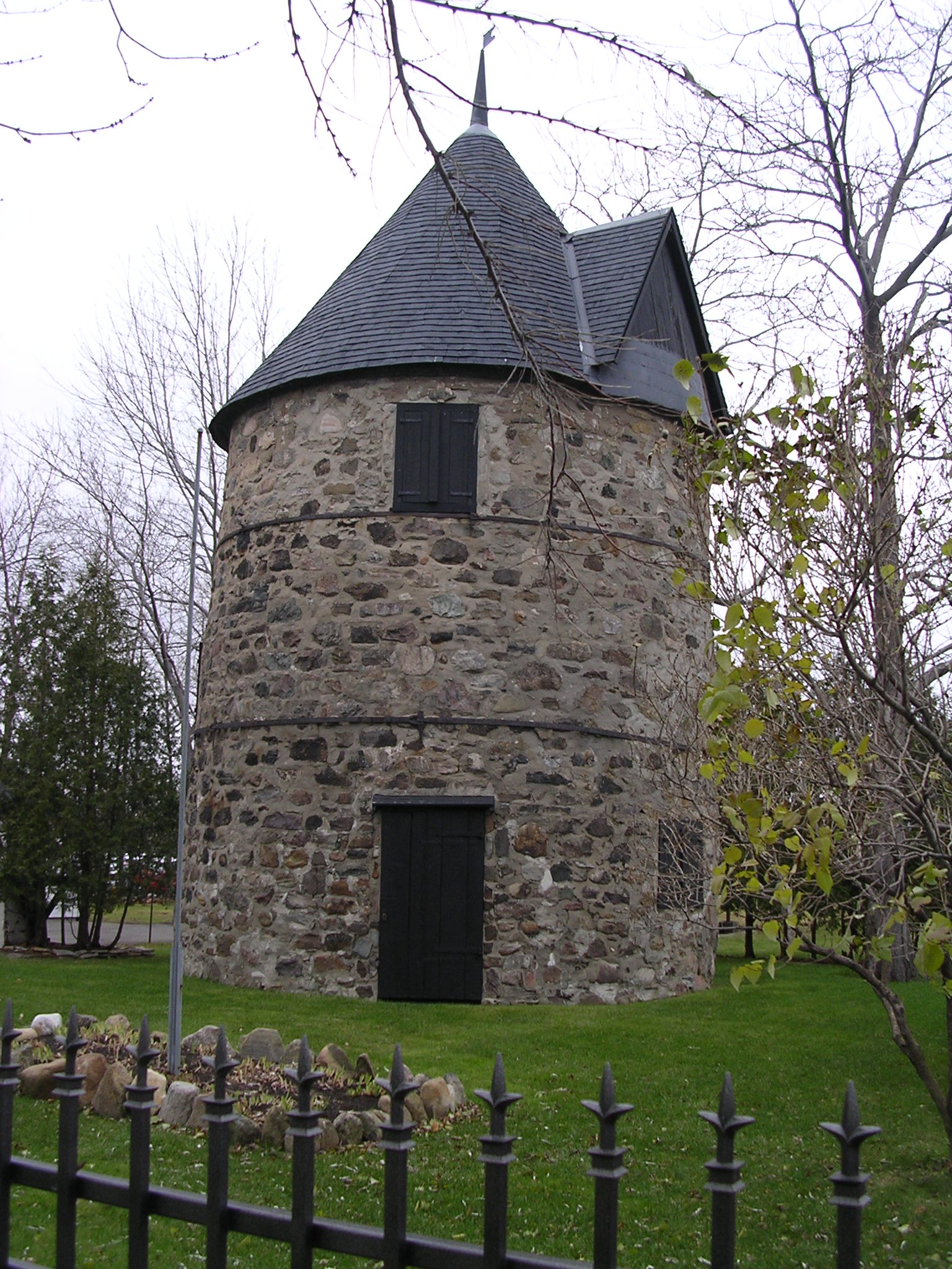 Moulin à vent Antoine-Jetté, situé à Repentigny (Lanaudière, Québec). Il est connu aussi sous le nom de Moulin Séguin. Moulin à farine; moulin Jetté.